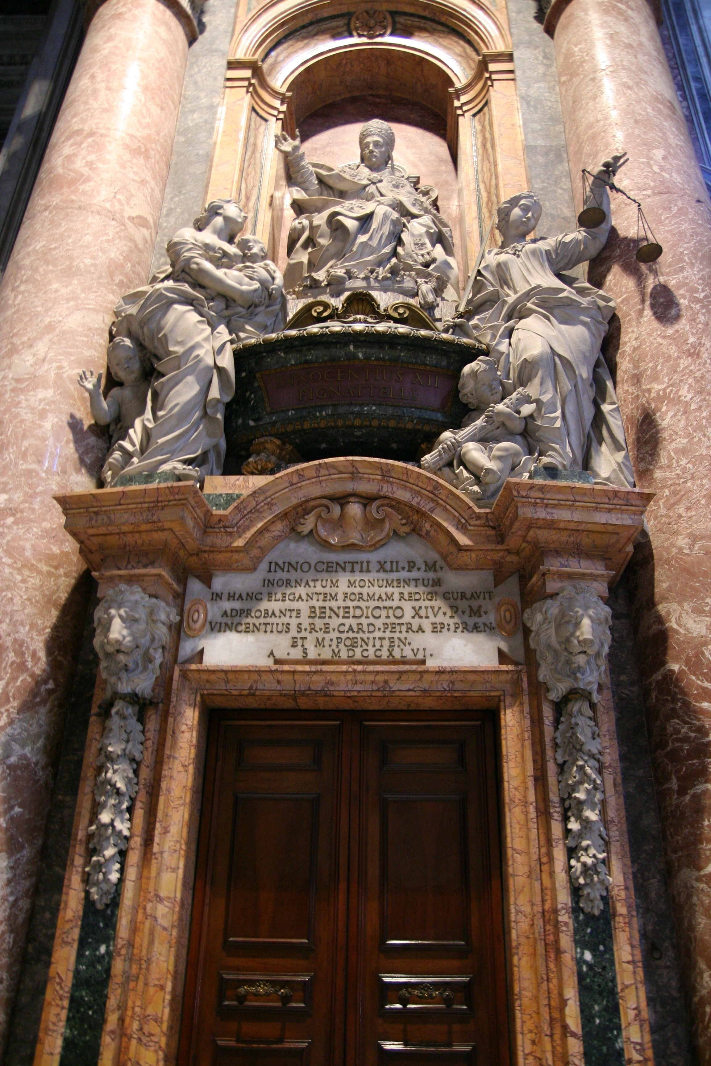 Pope Innocent XII Tomb